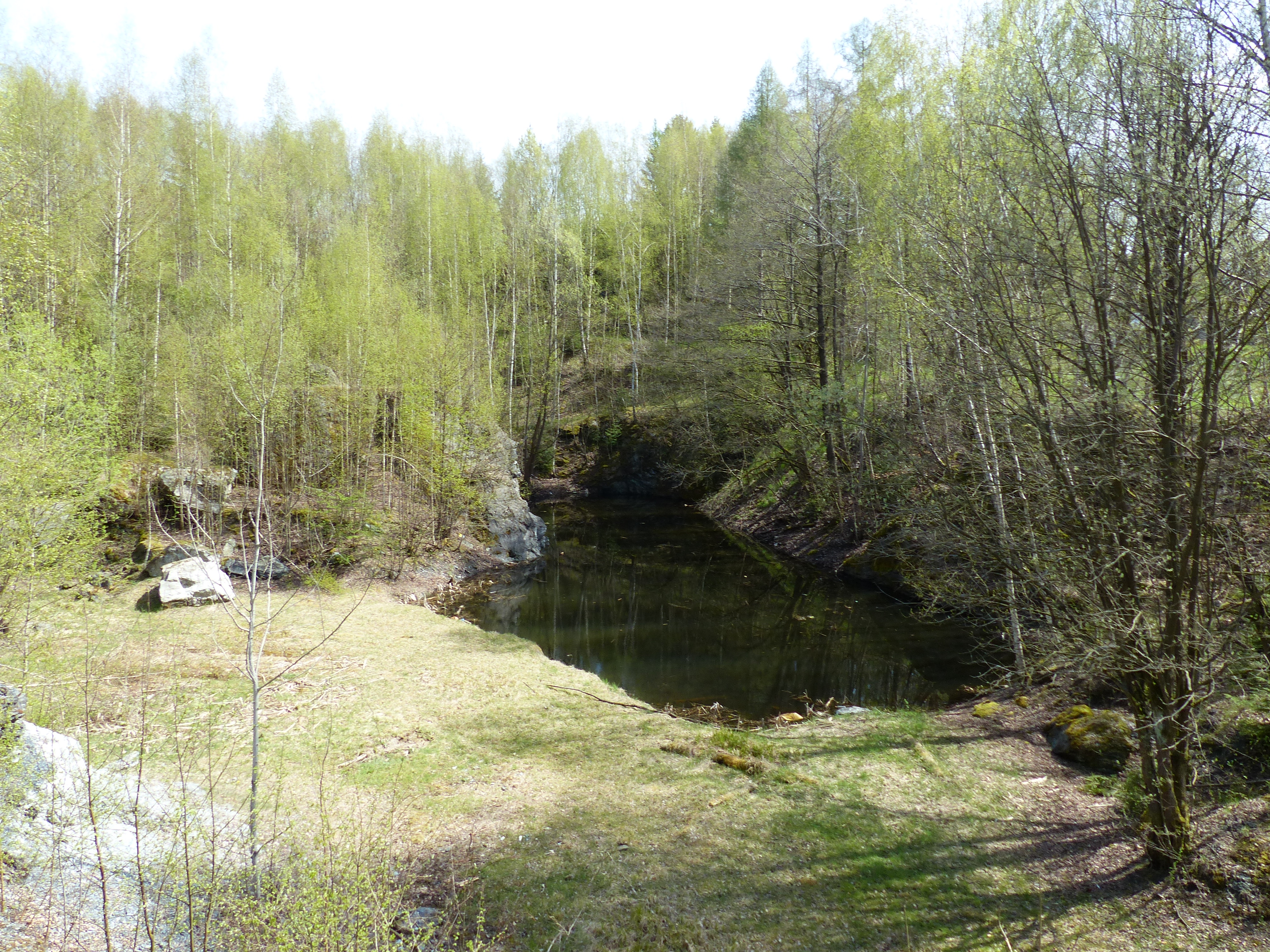 Geotop innerhalb der Stadt Schwarzenbach an der Saale